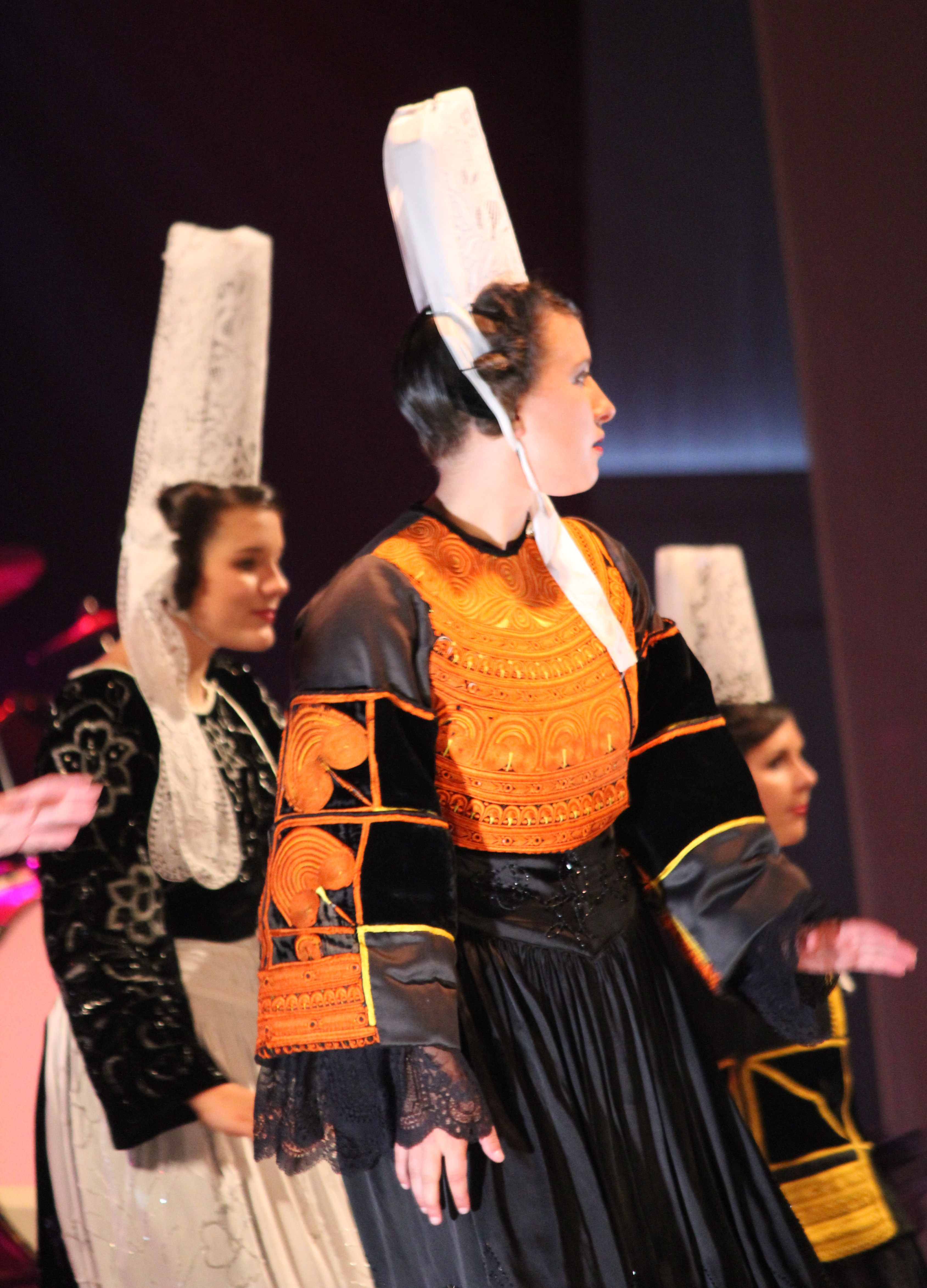 Bigoudènes.